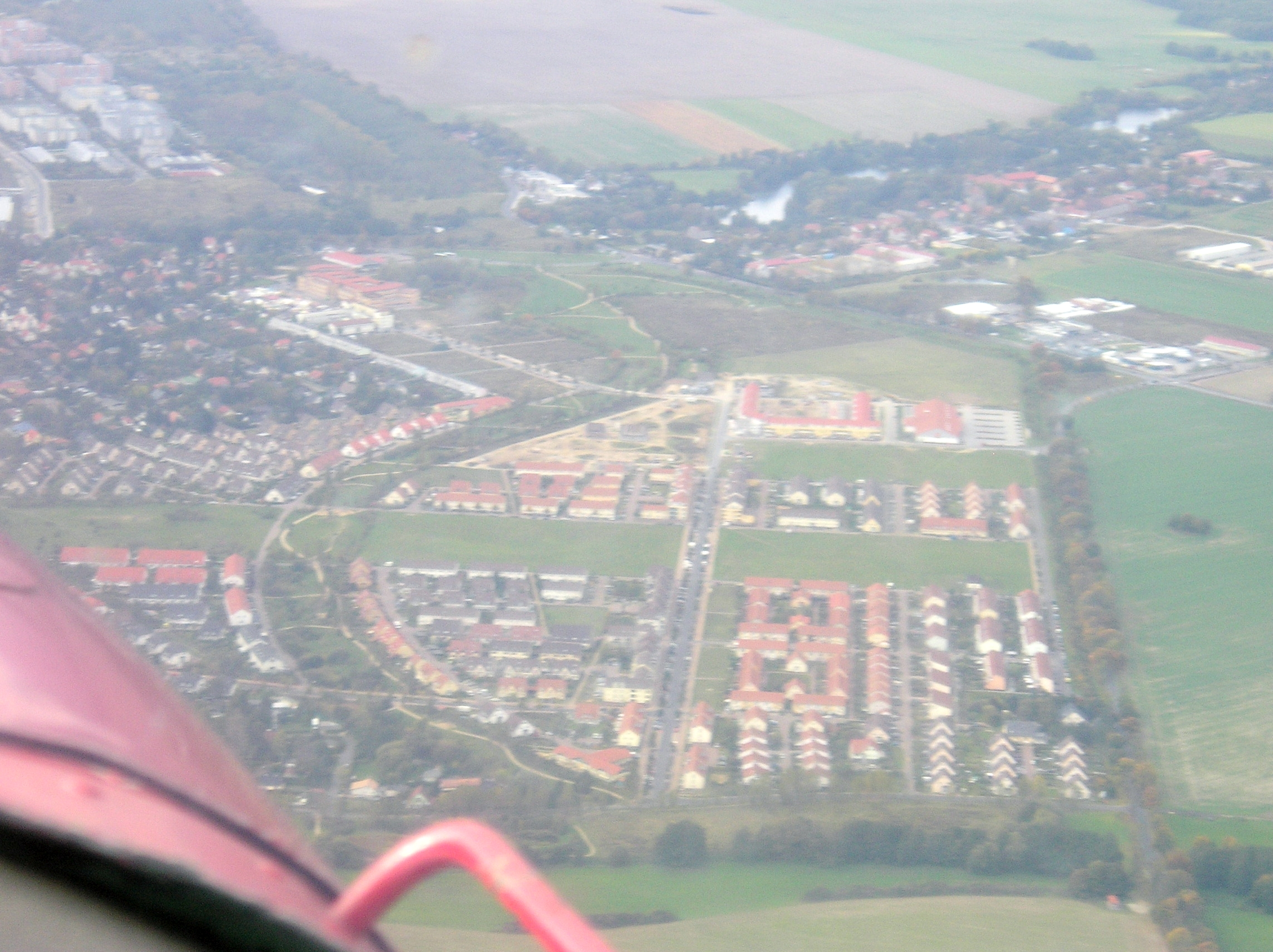 Hoenow_Siedlungserweiterung,pk1,ownphoto,18102005